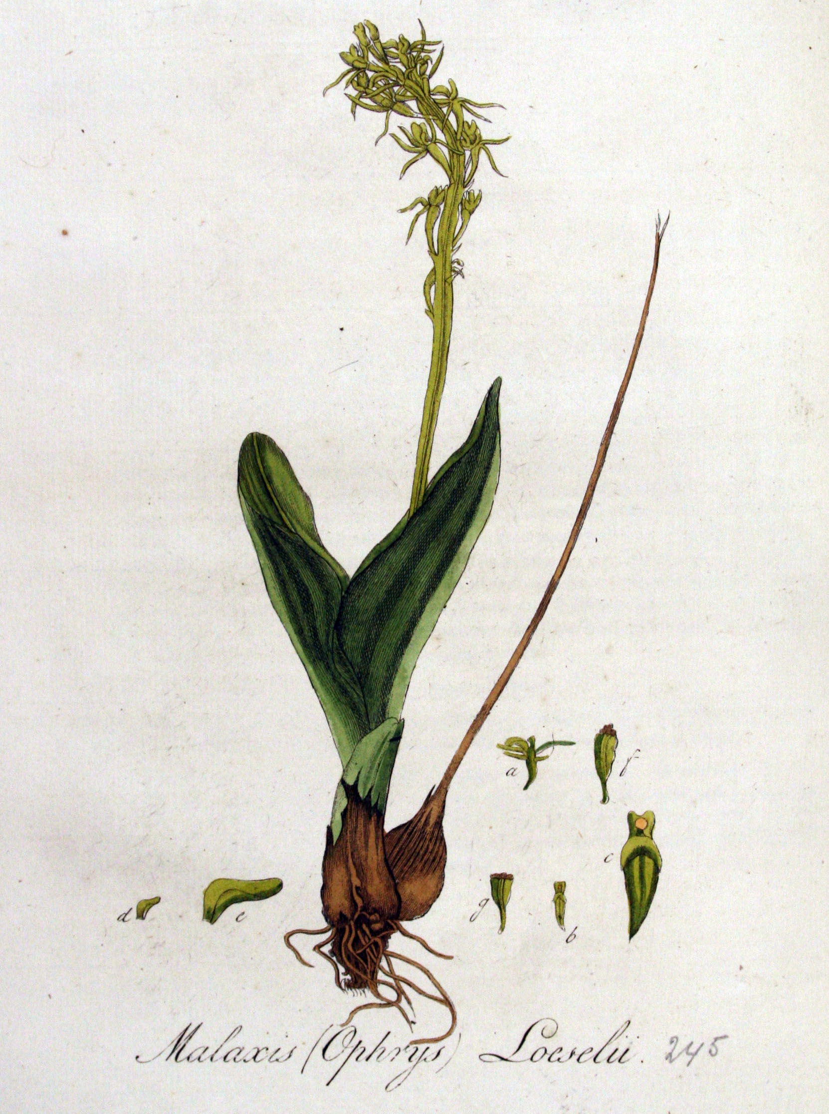 Liparis loeselii (L.) L.C.M. Rich. (Syn. Malaxis loeselii Swartz)